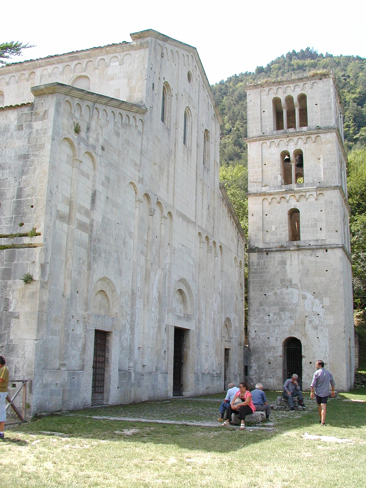 San Liberatore a Majella